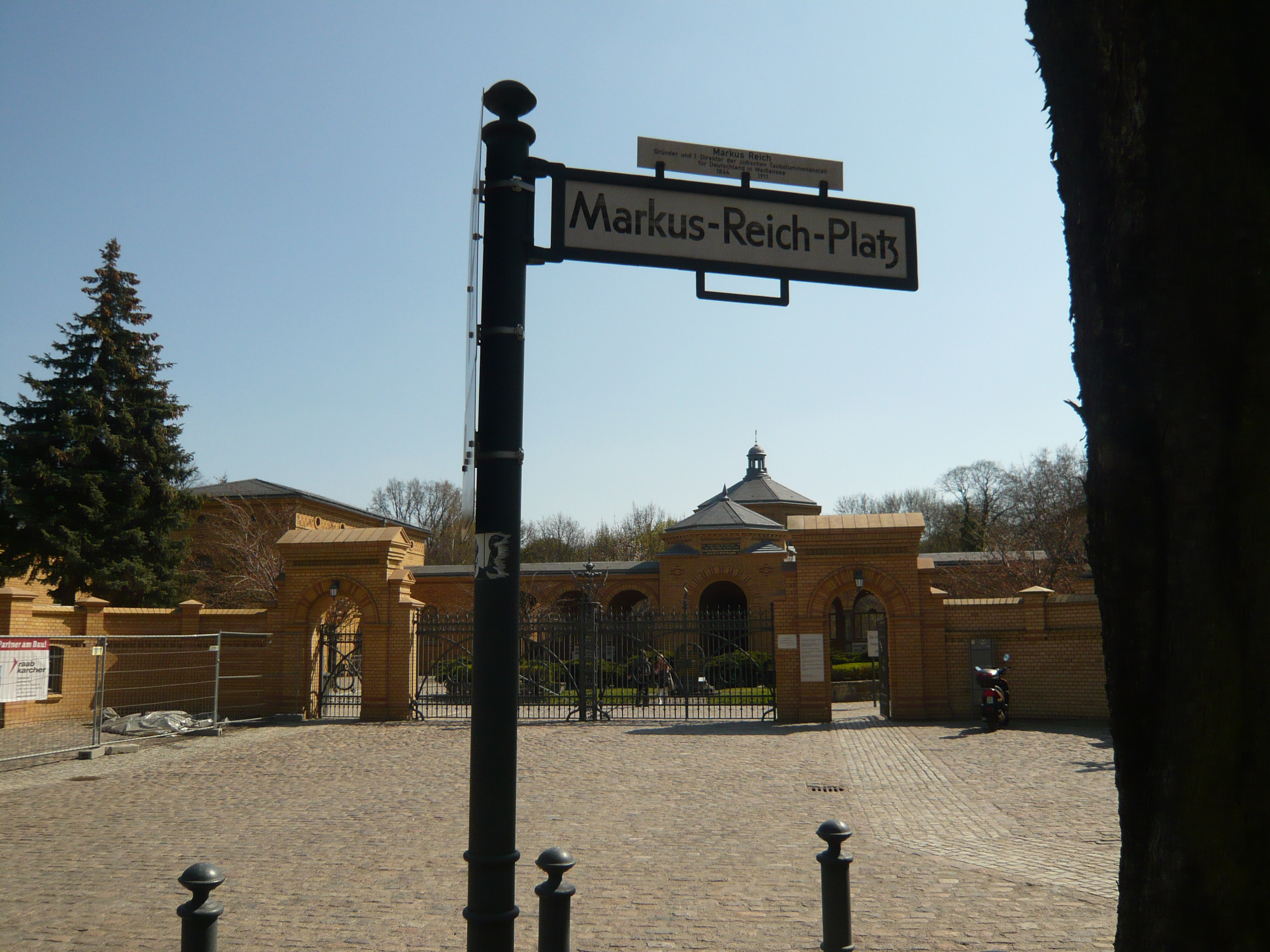 Straße im Ortsteil Berlin-Weißensee: Markus-Reich-Platz